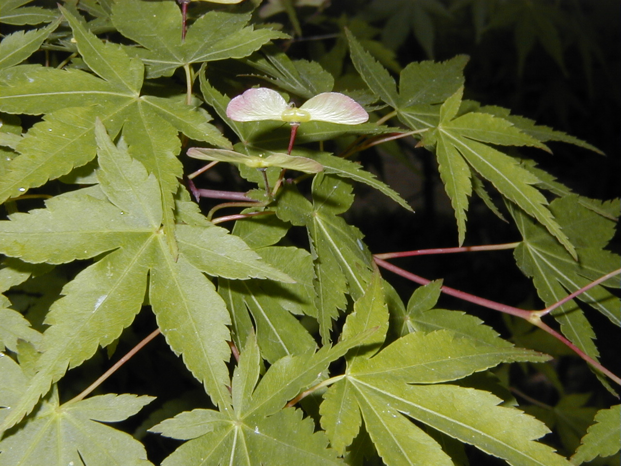 Acer palmatum, fruto. Real Jardín Botánico, Madrid.